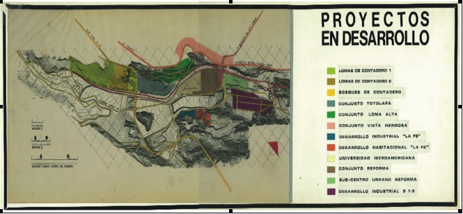 Lámina donde se explican todos los proyectos que abarcaba el Proyecto Santa Fe DF Durante el período 1980 – 1983 los avances más notables de Santa Fe fueron: • La formación de una reserva territorial de 450 Hectáreas • La transformación de una zona de explotación minera y depósito de basuras en “tierra legal y apta” en una expresión de Raúl Martínez Almazán. • Lograr que el Proyecto de Ciudad Santa Fe fuera autofinanciable. • La edificación de la Universidad Iberoamericana a partir de la donación que hizo el gobierno del Presidente José López Portillo de los predios a la institución educativa. • La realización de diversas obras de infraestructura urbana y de servicios como son el entronque vial Paseo de la Reforma - Santa Fe; el túnel y vialidad de liga Santa Fe – Bosque de las Lomas y diversas obras de urbanización, hidraúlicas y alcantarillado. Desafíos • No se dispuso de recursos fiscales. • Topografía accidentada como consecuencia de la explotación minera. • Población desarticulada. • Asentamientos humanos irregulares en las minas y depósito de basuras.